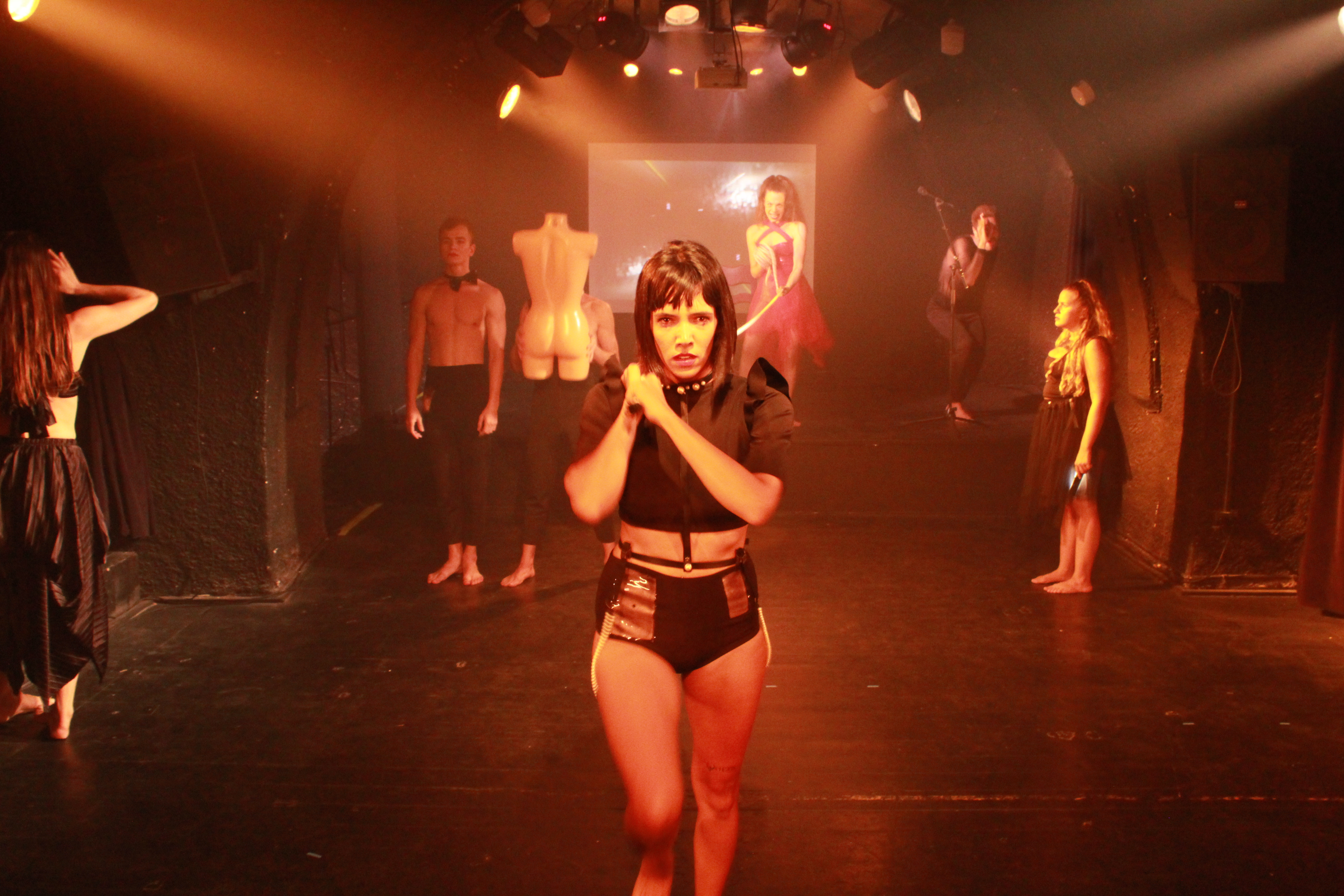 ההצגה "פרפרים בזריחה" מאת ובבימויו של עידן זילברשטיין